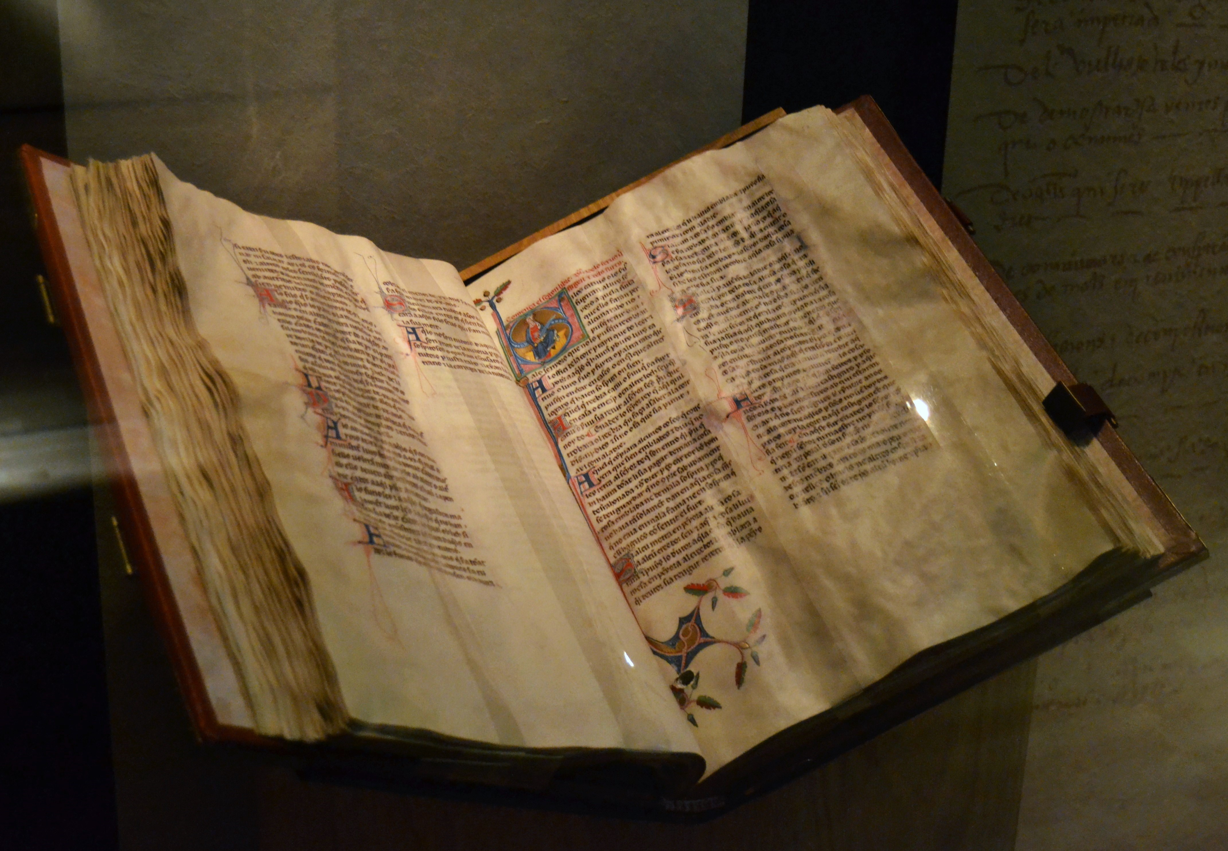 Còdex dels Furs de València, palau de Cervelló, València. Primera recopilació de lleis valencianes aprovades per les Corts entre els regnats de Jaume I i Alfons IV, realitzada pel notari Bonanat Pedra el 1329, moment en què es va pretendre aplicar l'aplicació dels Furs de València a tots els locs del regne. Els representants dels tres braços del regne (església, noblesa i viles reials) aprovaven aquestes lleis o furs reunits en assemblea davant el rei.